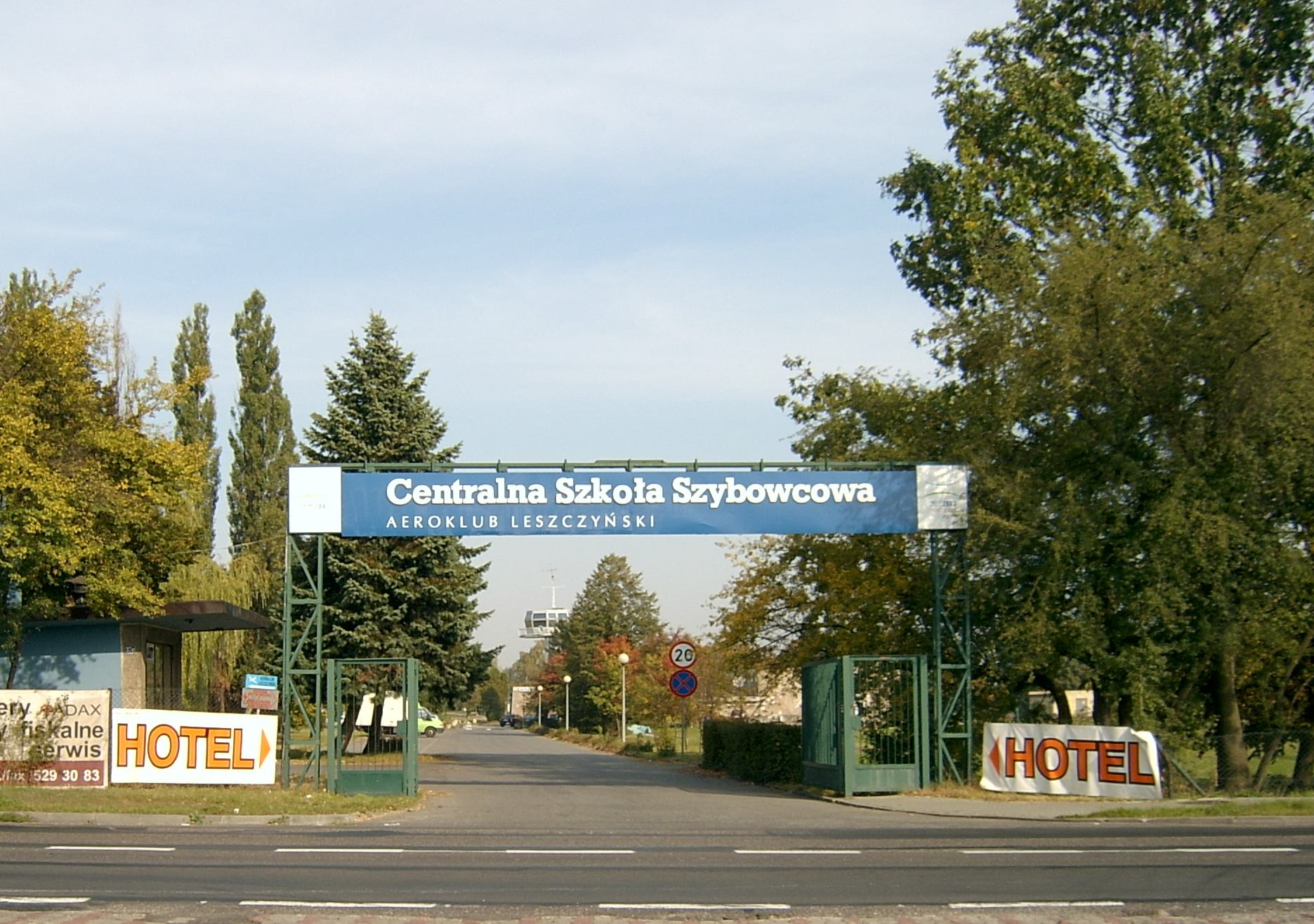 Leszno, am Flugplatz Leszno